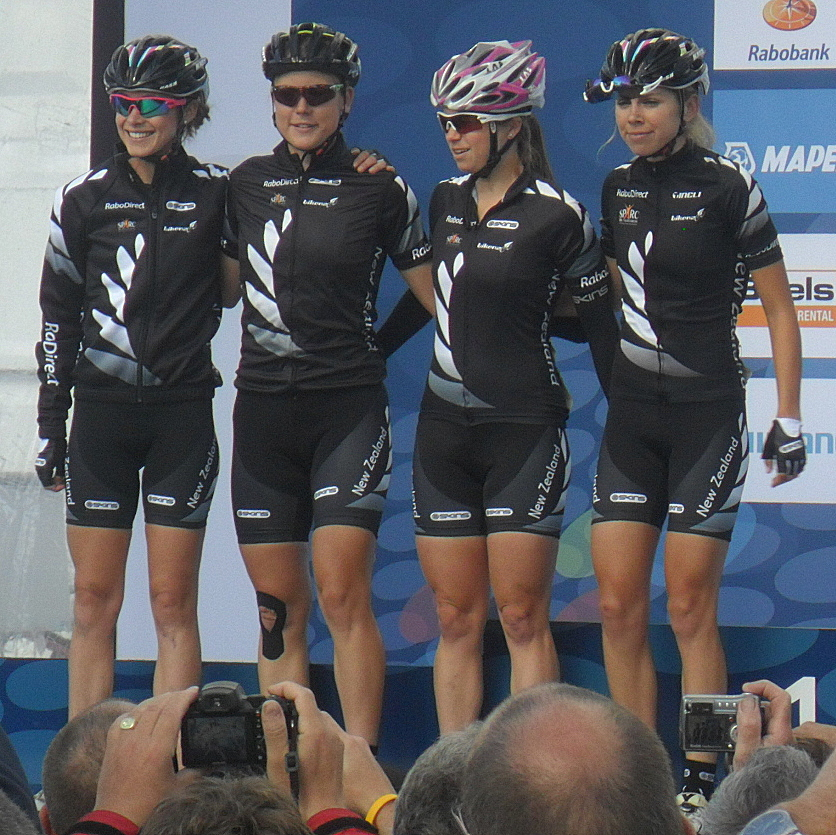 Ploegenpresentatie Nieuw-Zeeland voor de start van het Wereldkampioenschap 2012 in Valkenburg, Nederland.